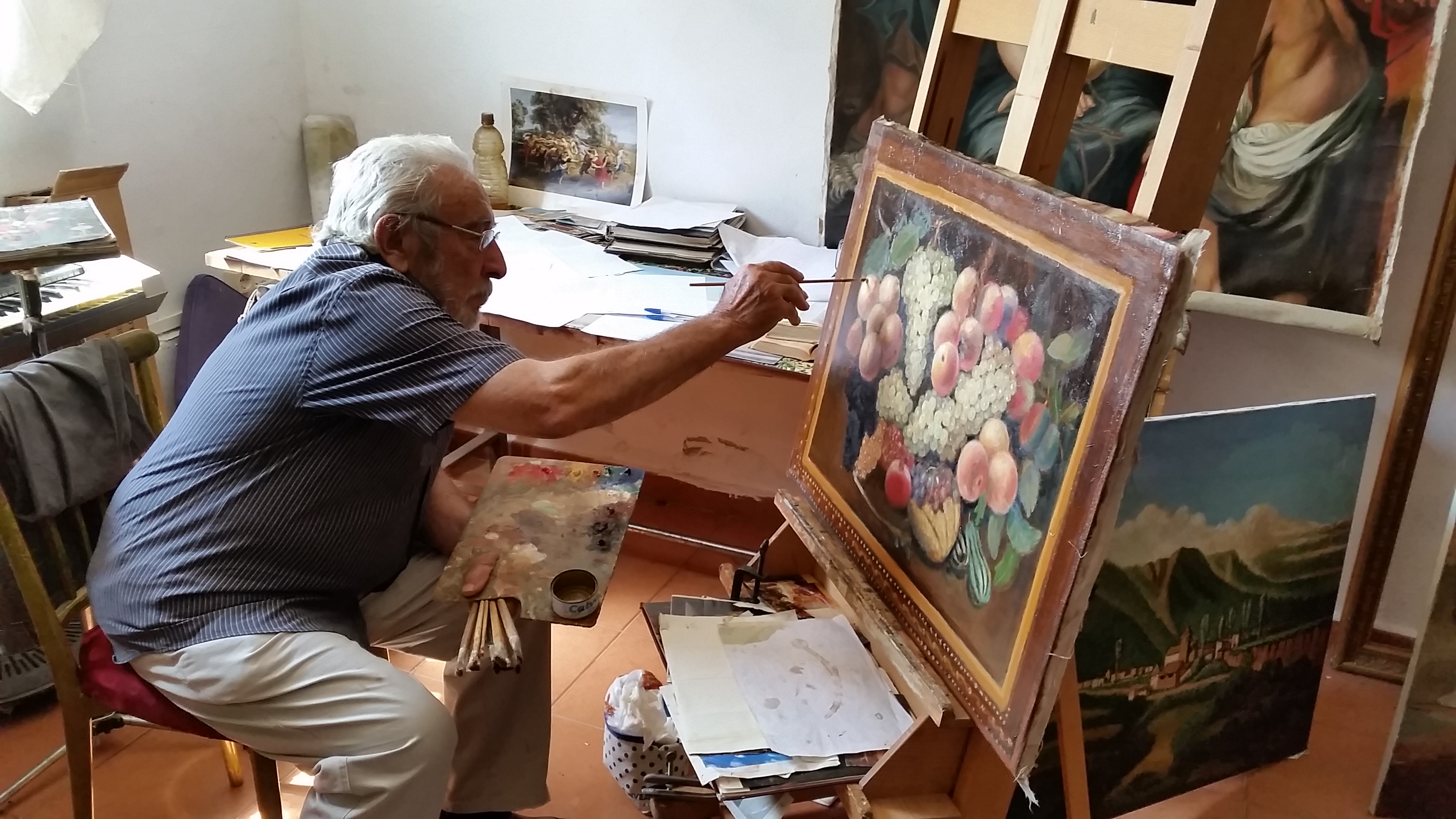 El pintor Ángel García de Diego posando con varias de sus obras en su casa. Copias de cuadros del Museo Nacional del Prado (Madrid), museo del que es copista autorizado desde los años 80.